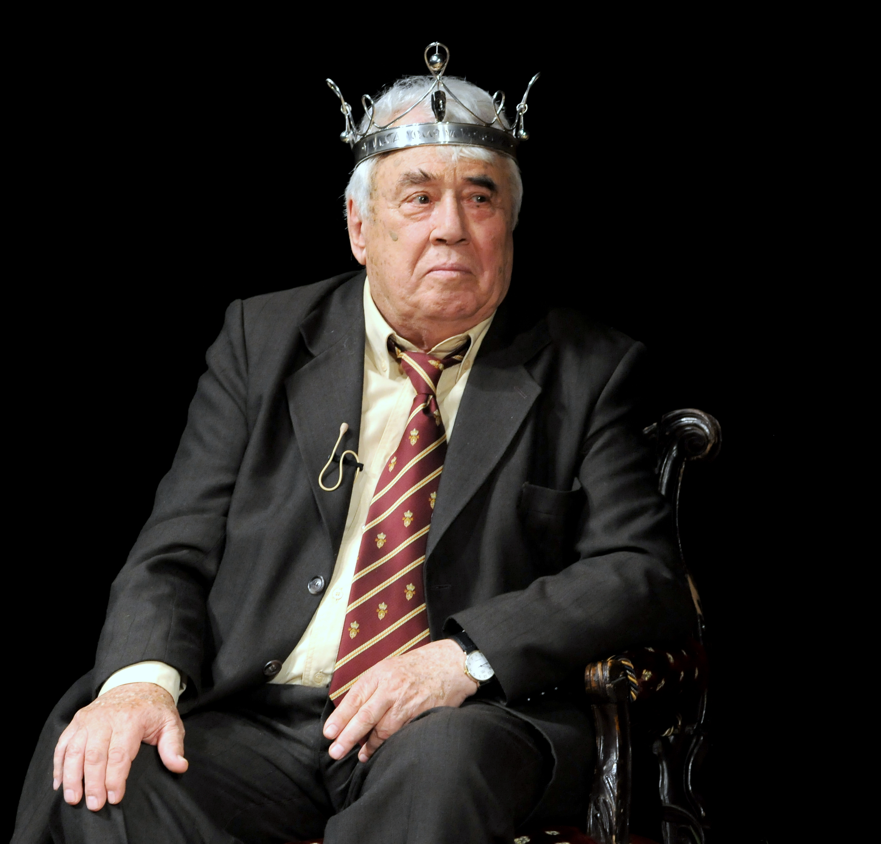 Georgi Kaloyanchev - Kalata